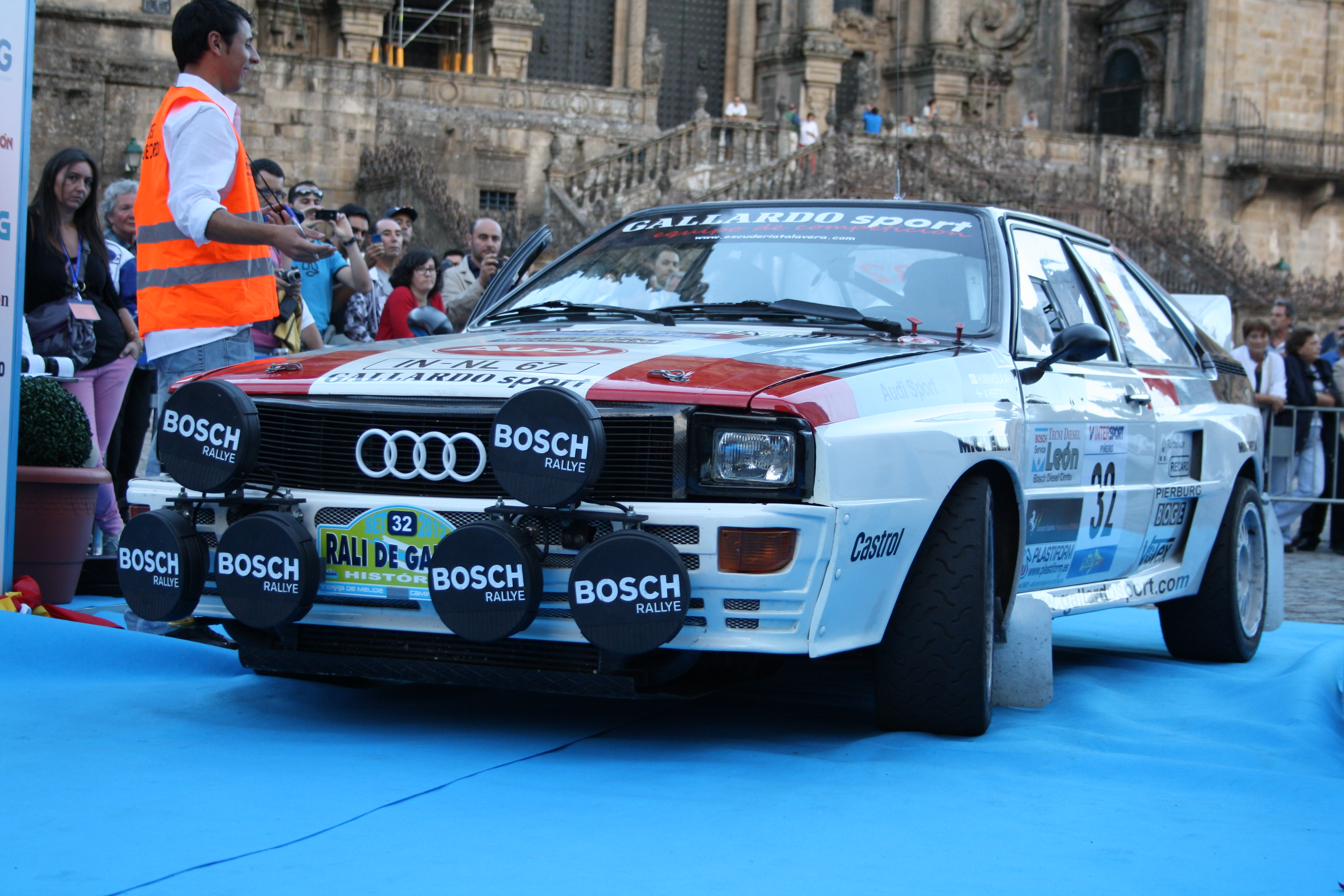 Audi Quattro en el Rally de Galicia Histórico de 2012.